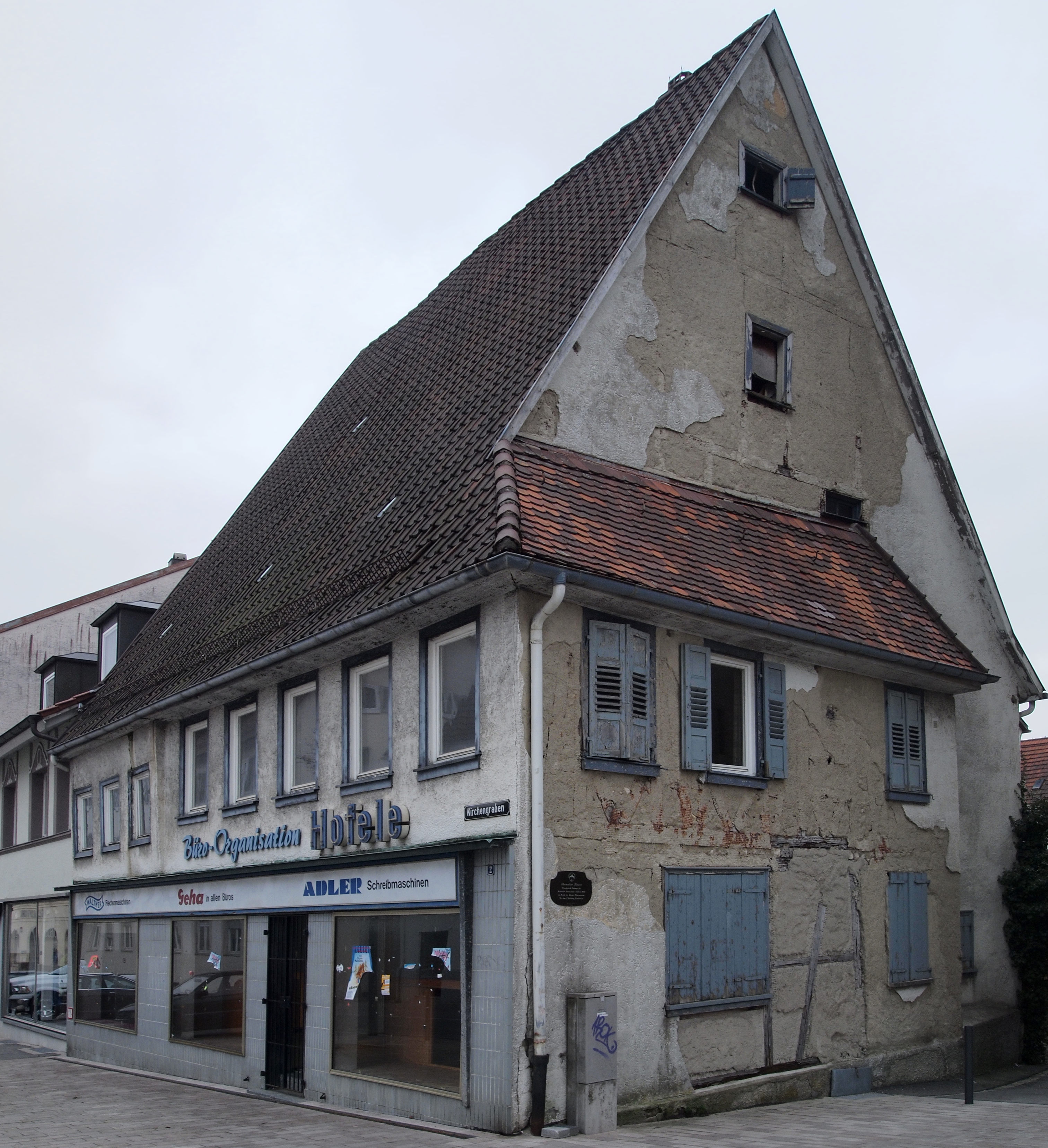 Ehemalige Klause (1344-1605) der Franziskaner-Tertiarinnen in Ebingen. 1695 Kirchenwirt. Zuletzt Büromaschinenhandlung Hofele. Seit 2016 Café & Pension "Josis Klause".